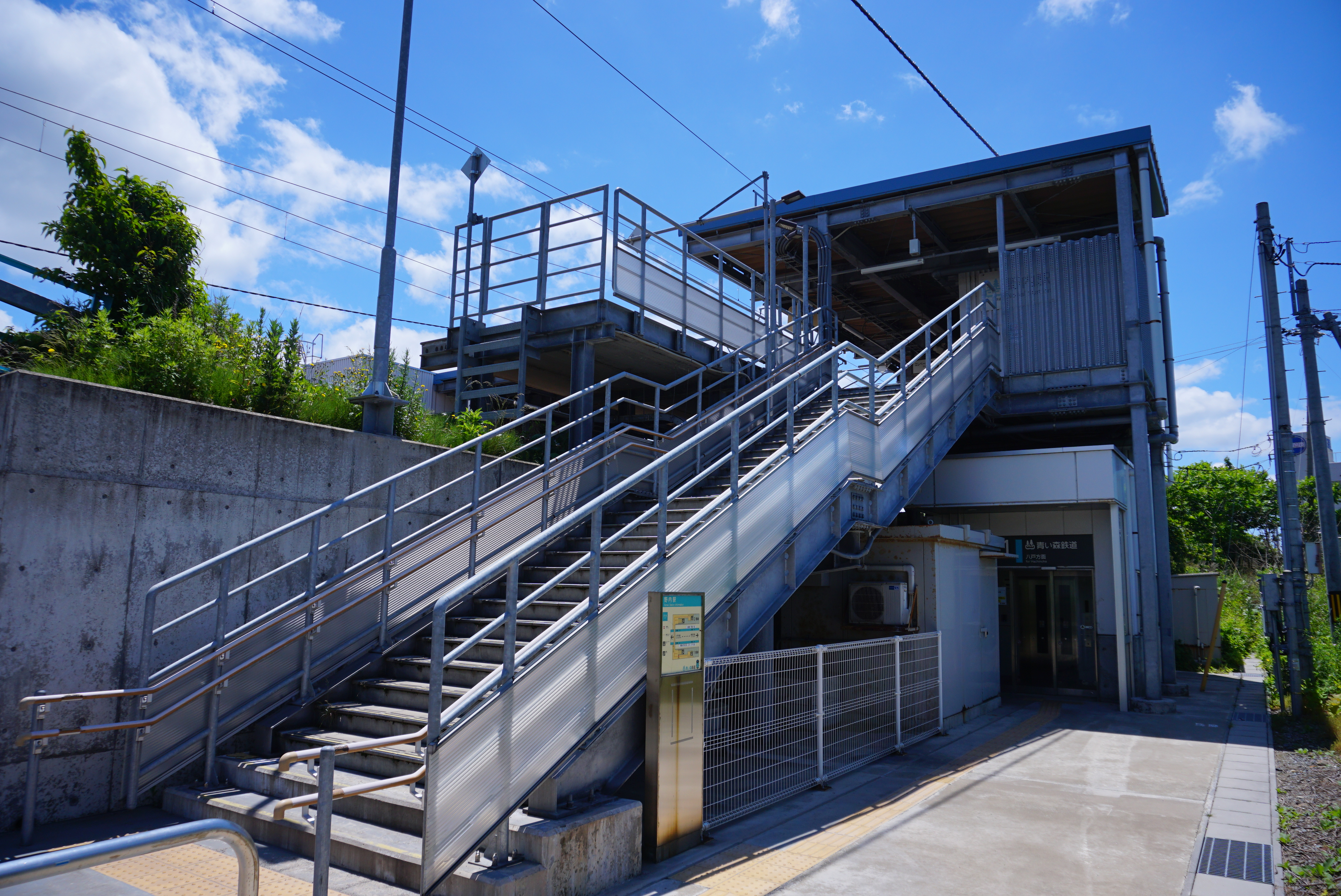 青い森鉄道 野内駅（青森県青森市）。東北新幹線盛岡以北の延伸開業に伴いかつての東北本線が第三セクターに移管された青い森鉄道線であるが、野内駅は青い森鉄道によって旧駅から移設され、実質的には新たに建設された駅である。